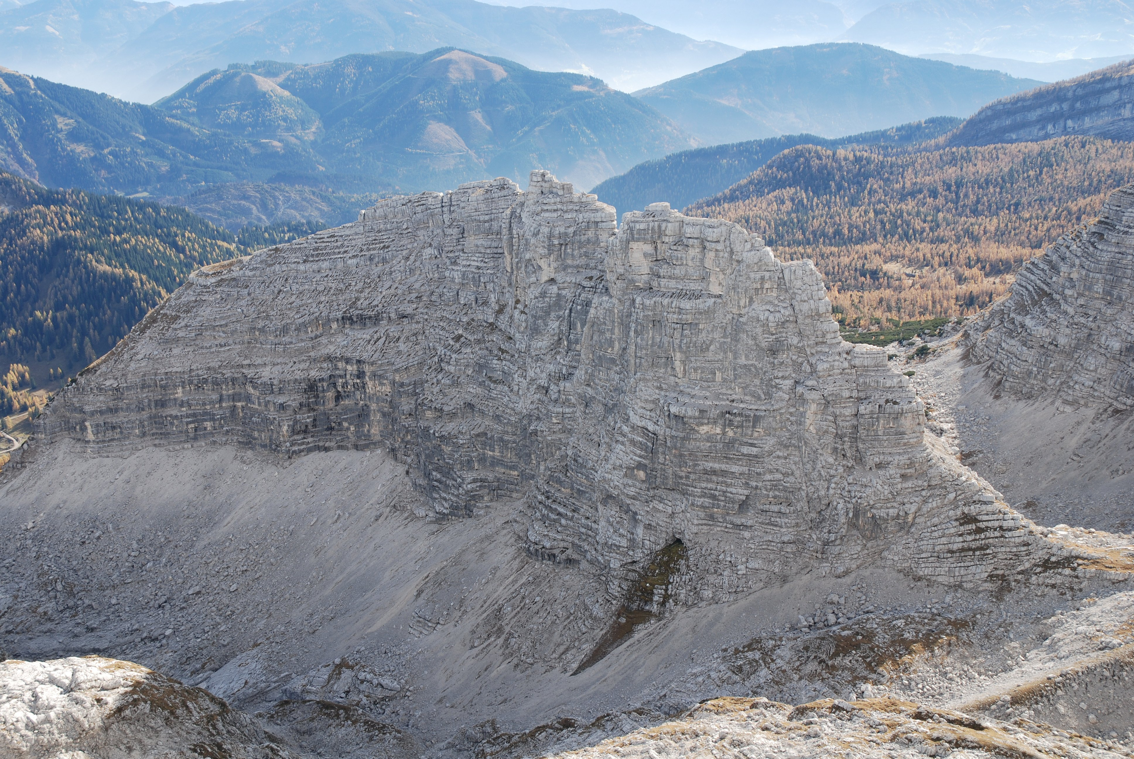 Ramesch (North side) with Ramesch-Knochenhöhle, Upper Austria, Austria